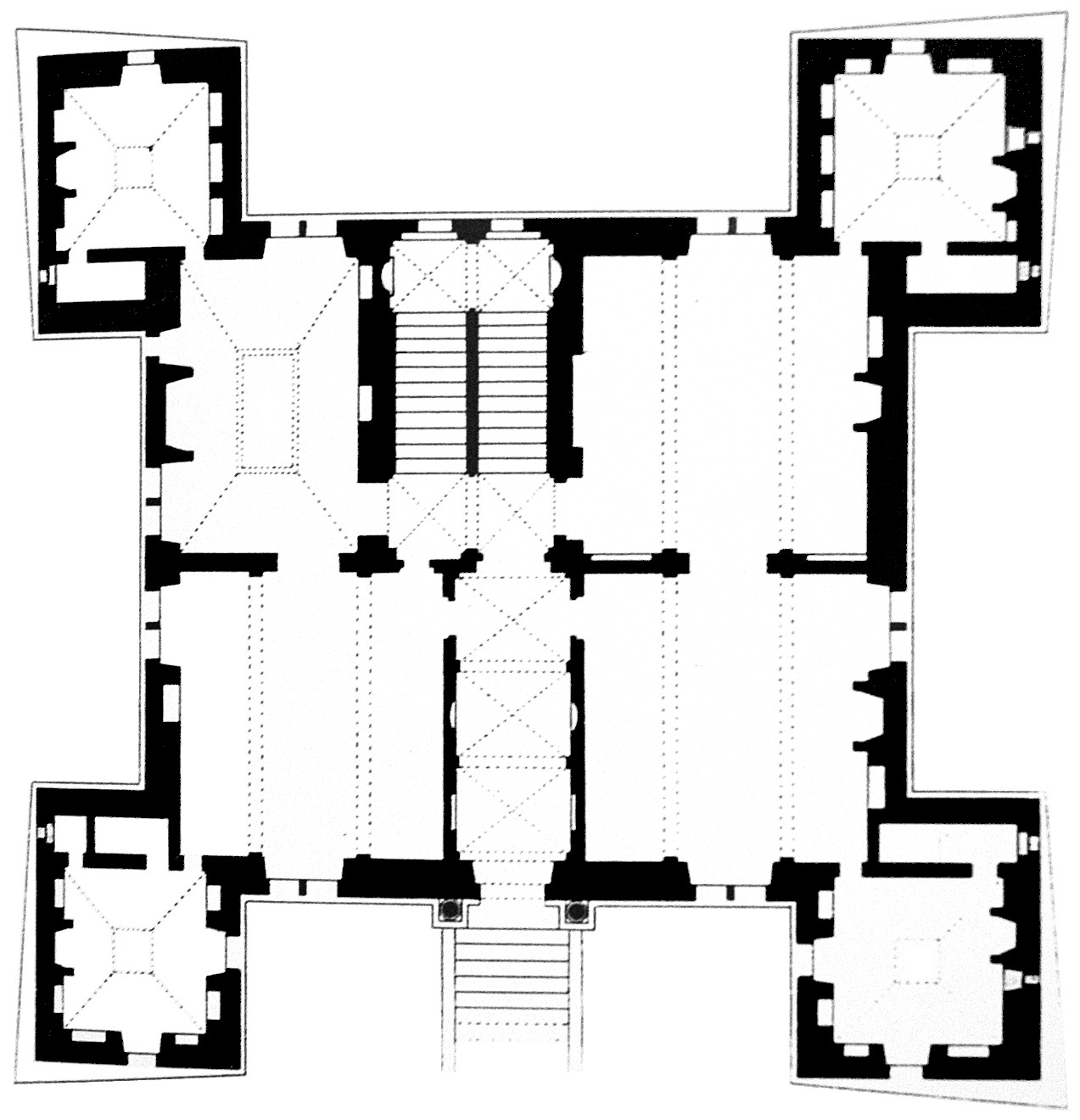 Erdgeschoss-Grundriss des Schlosses Bailleul in der Normandie